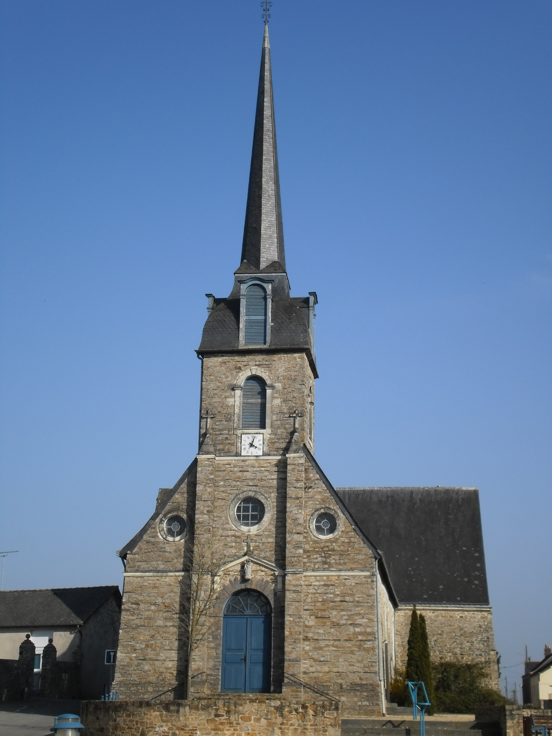 façade ouest de l'église de Villepot (Loire-Altantique, France).